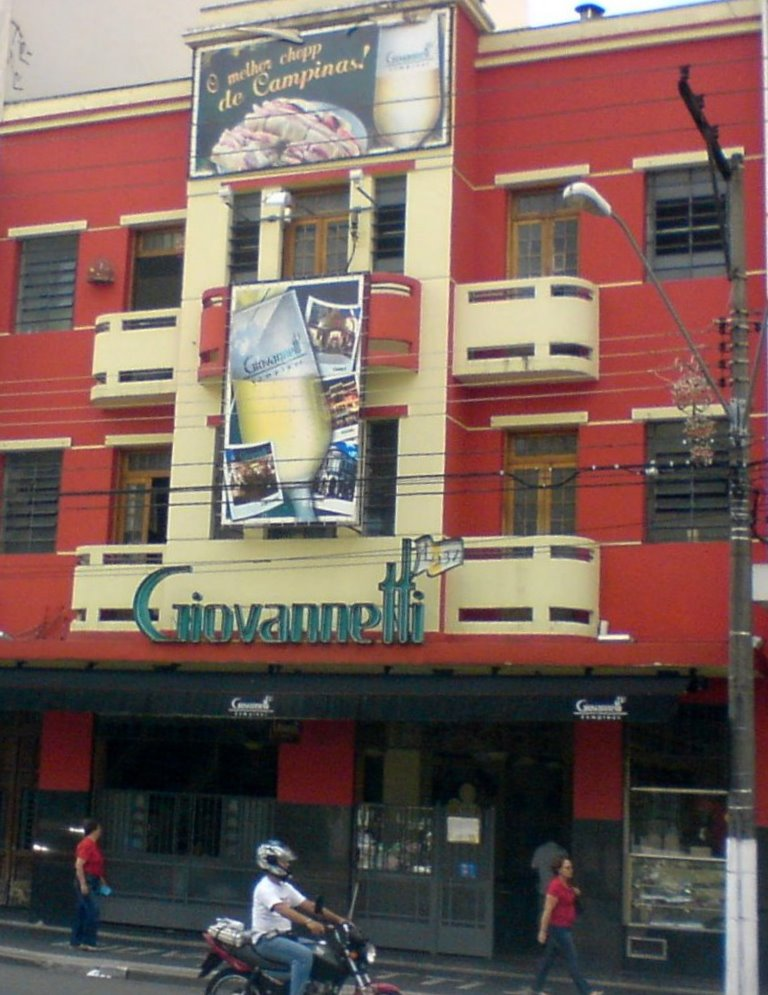 Giovannetti